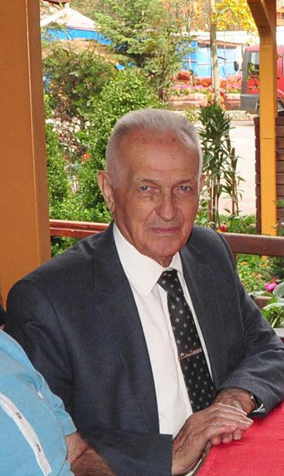 Ali Osman Ulusoy